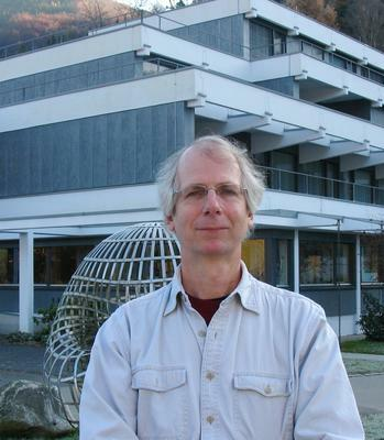 Foto di William Cook